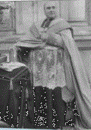 Émile Le Camus, évêque de La Rochelle.